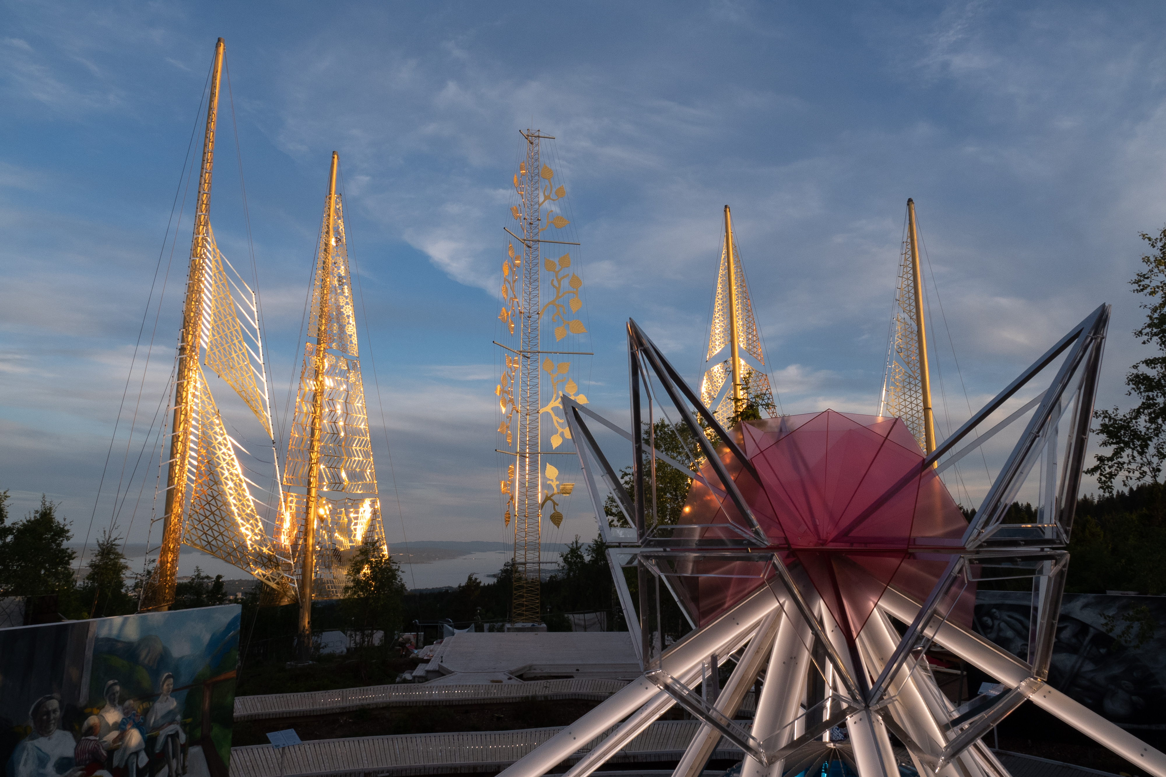 Roseslottet foto: Sandbox